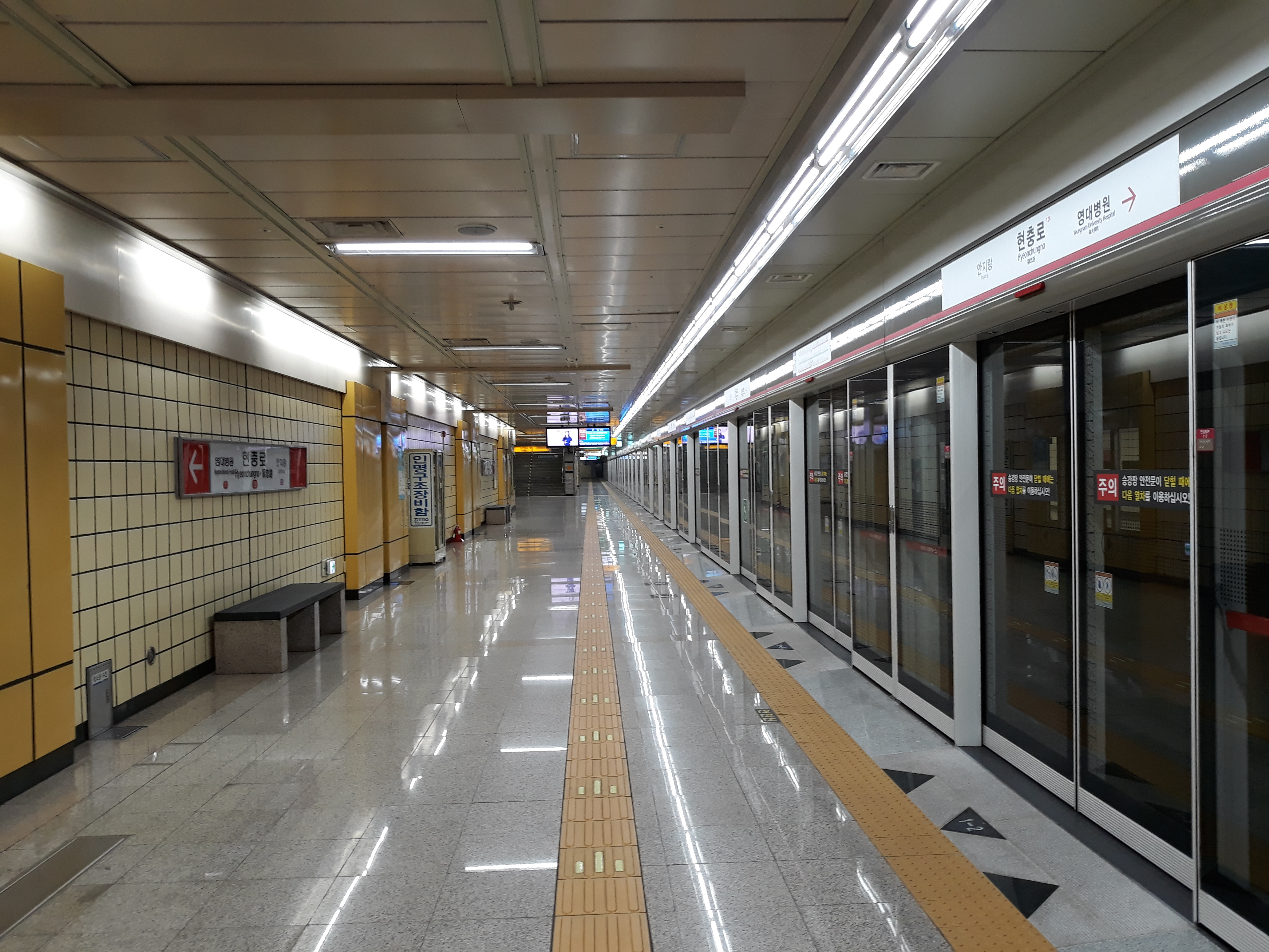 대구 도시철도 1호선 현충로역 안심 방면 승강장